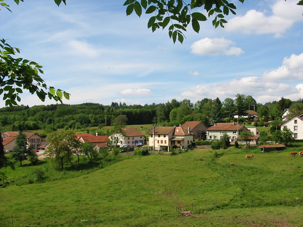 Le Vermont Commune du canton de Senones (Vosges) Photo personnelle du 4 juin 2006. Copyright © Christian Amet